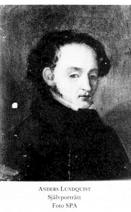 Självporträtt av konstnären och grafikern Anders Lundquist (1803-1853), Stockholm.